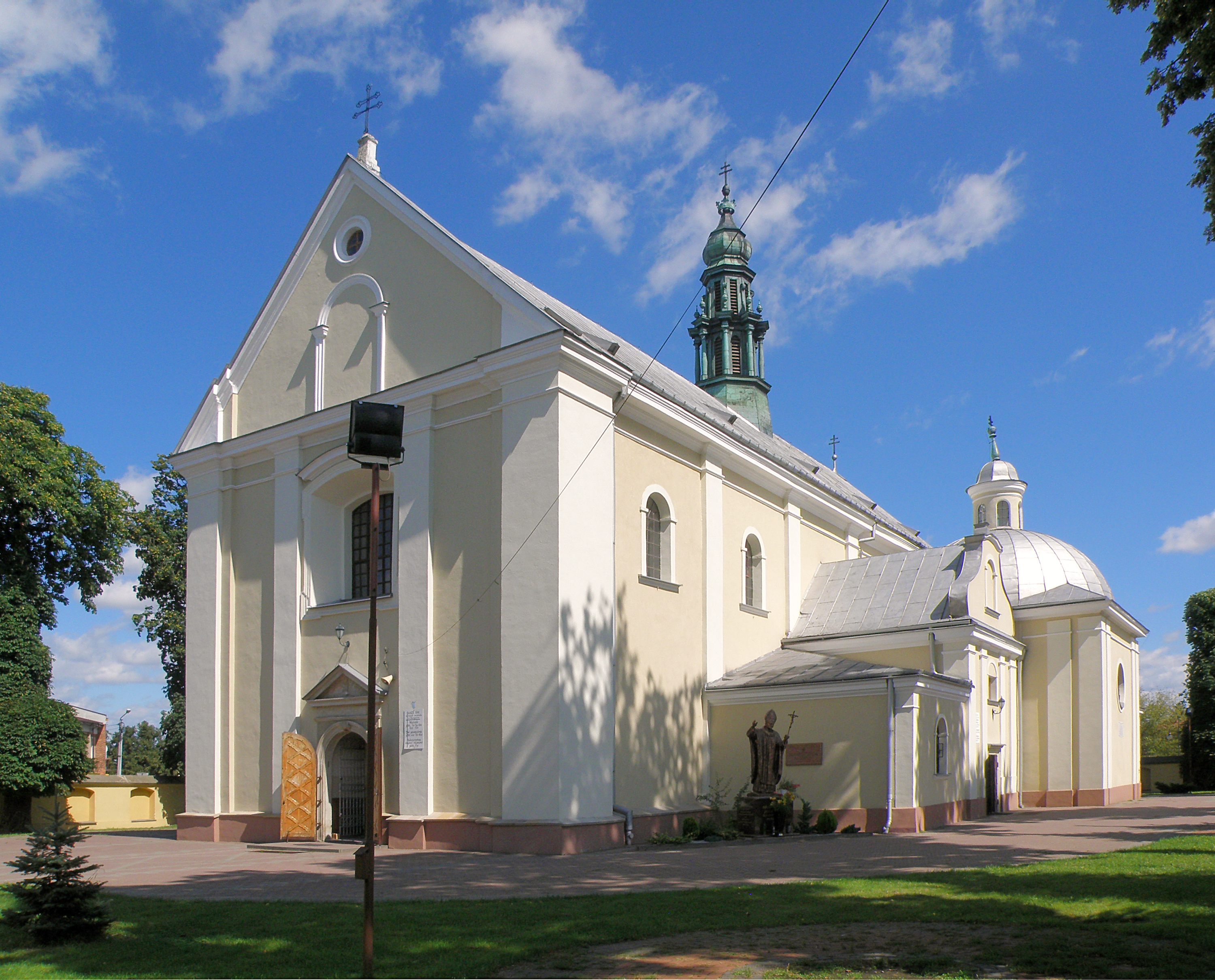 Skaryszew - woj. mazowieckie, powiat radomski, siedziba gminy miejsko-wiejskiej Skaryszew - Kościół św. Jakuba, 1691-1701, XIX,(452/A/57, 385/A oraz 148/A)